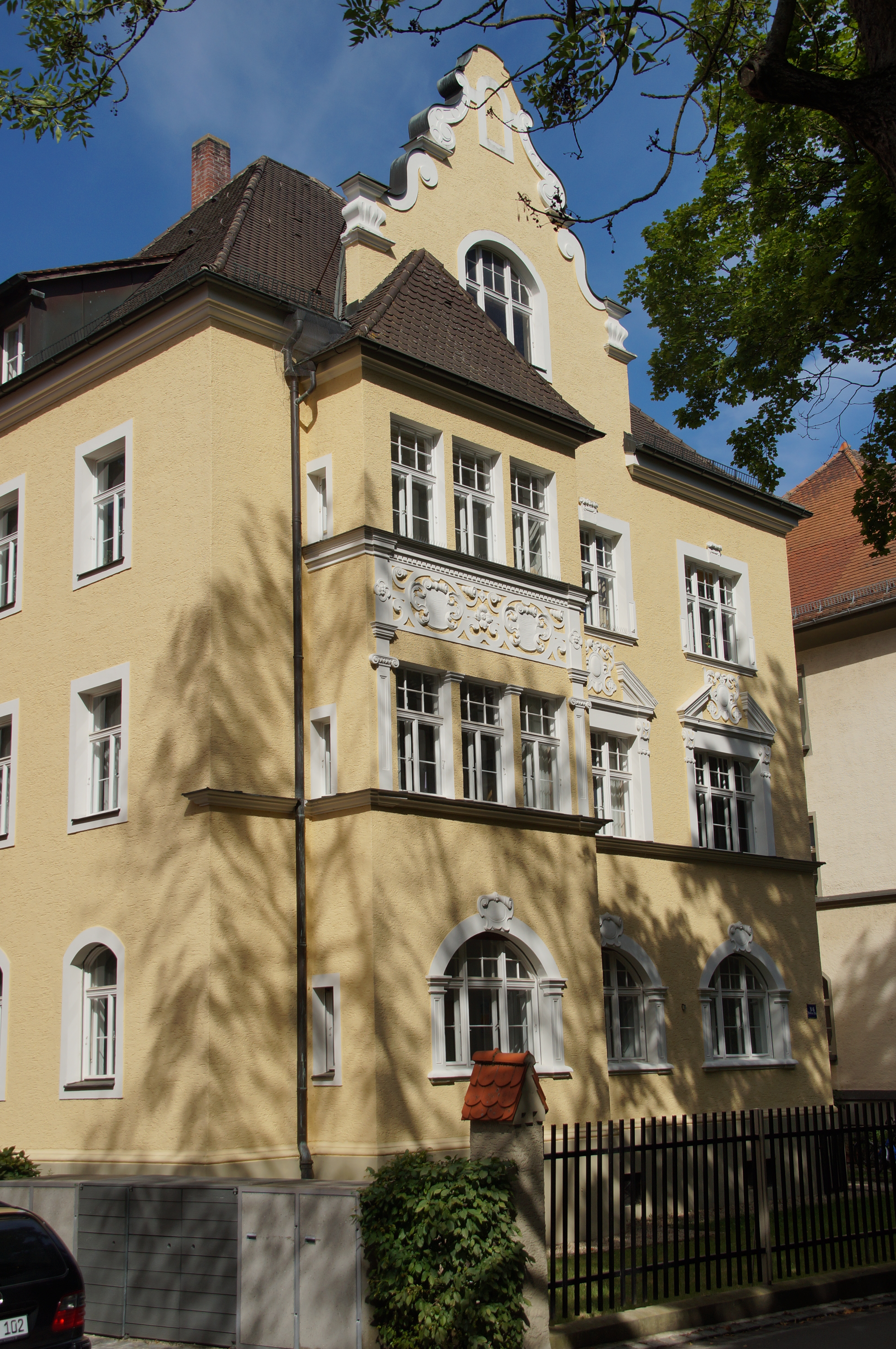 Mietshaus, dreigeschossiger Walmdachbau mit Standerker und Volutengiebel, Werksteingliederungen, Neurenaissance, 1902 von Hans Schricker und Christian Zinstag This is a photograph of an architectural monument.